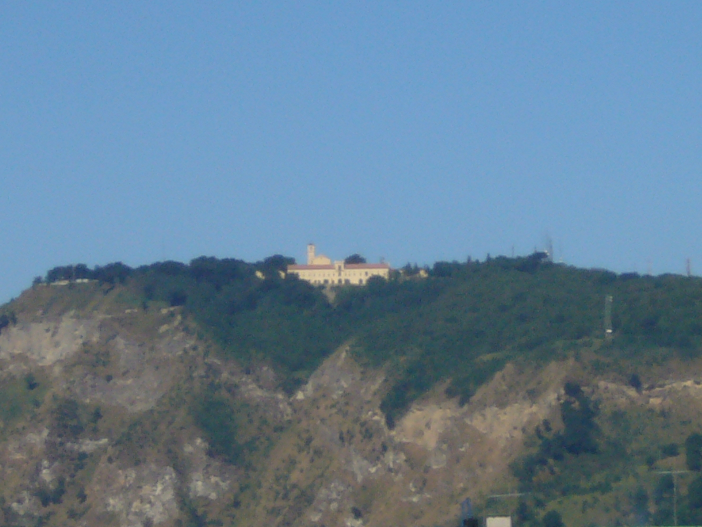 Napoli, eremo dei Camaldoli visto da Castel Sant'Elmo